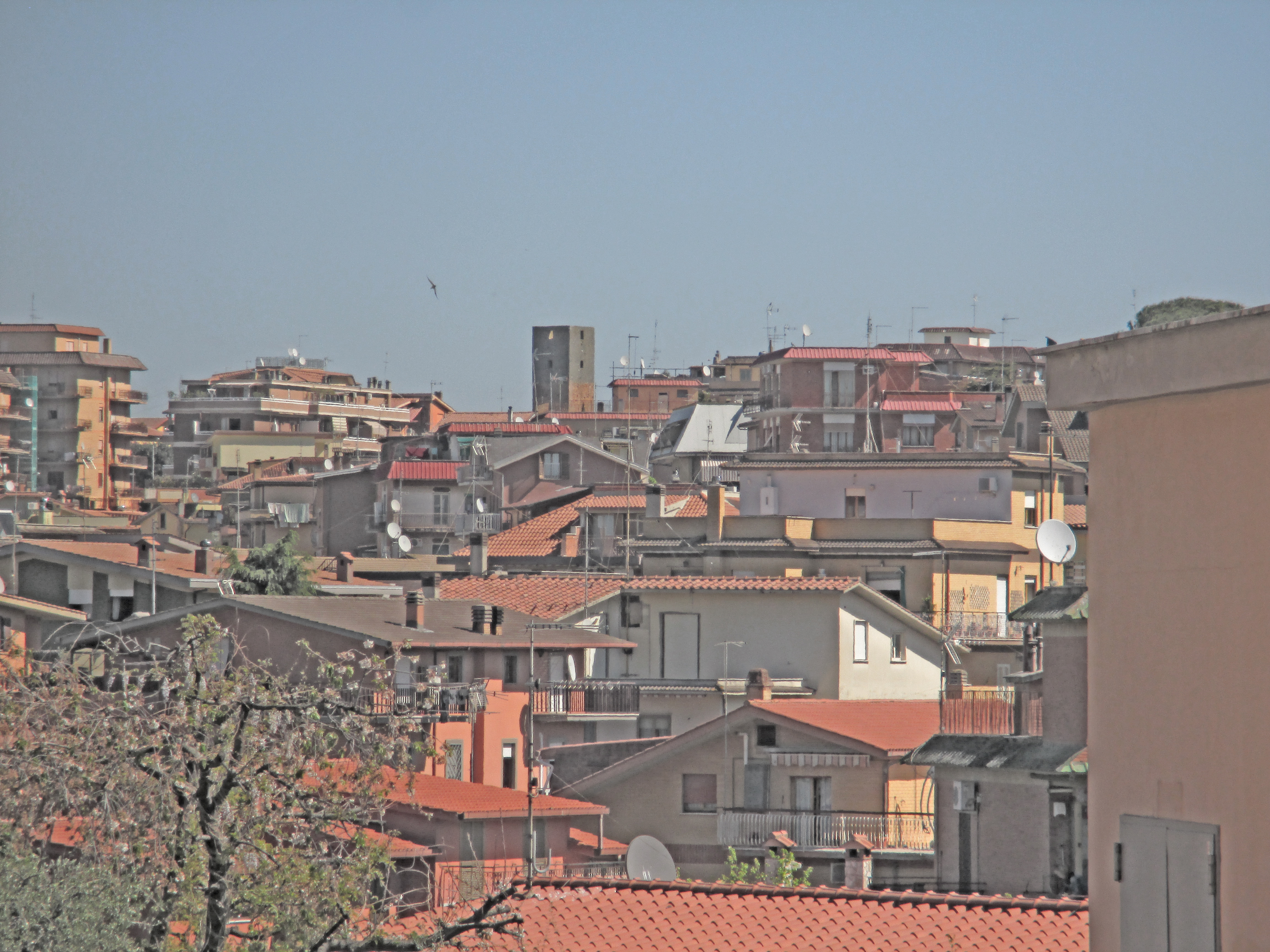 Panorama di Tor Lupara